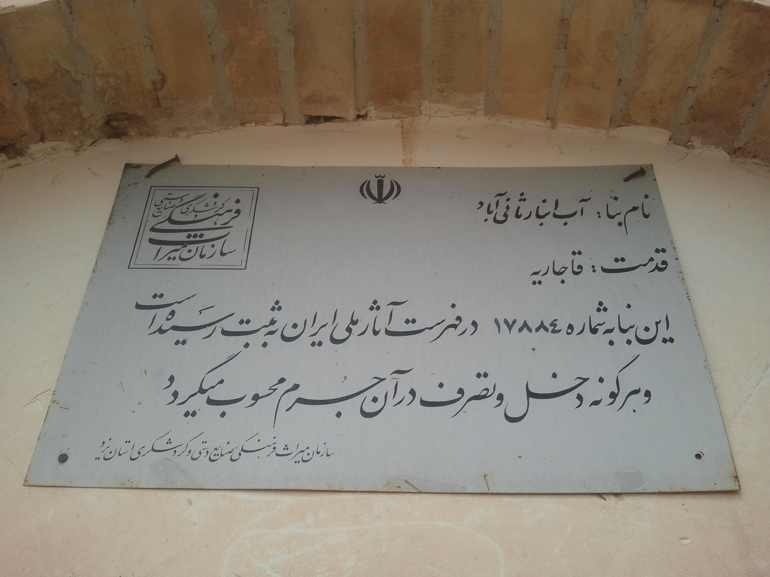 تابلوی میراث فرهنگی در بالای اب انبار ثانی اباد